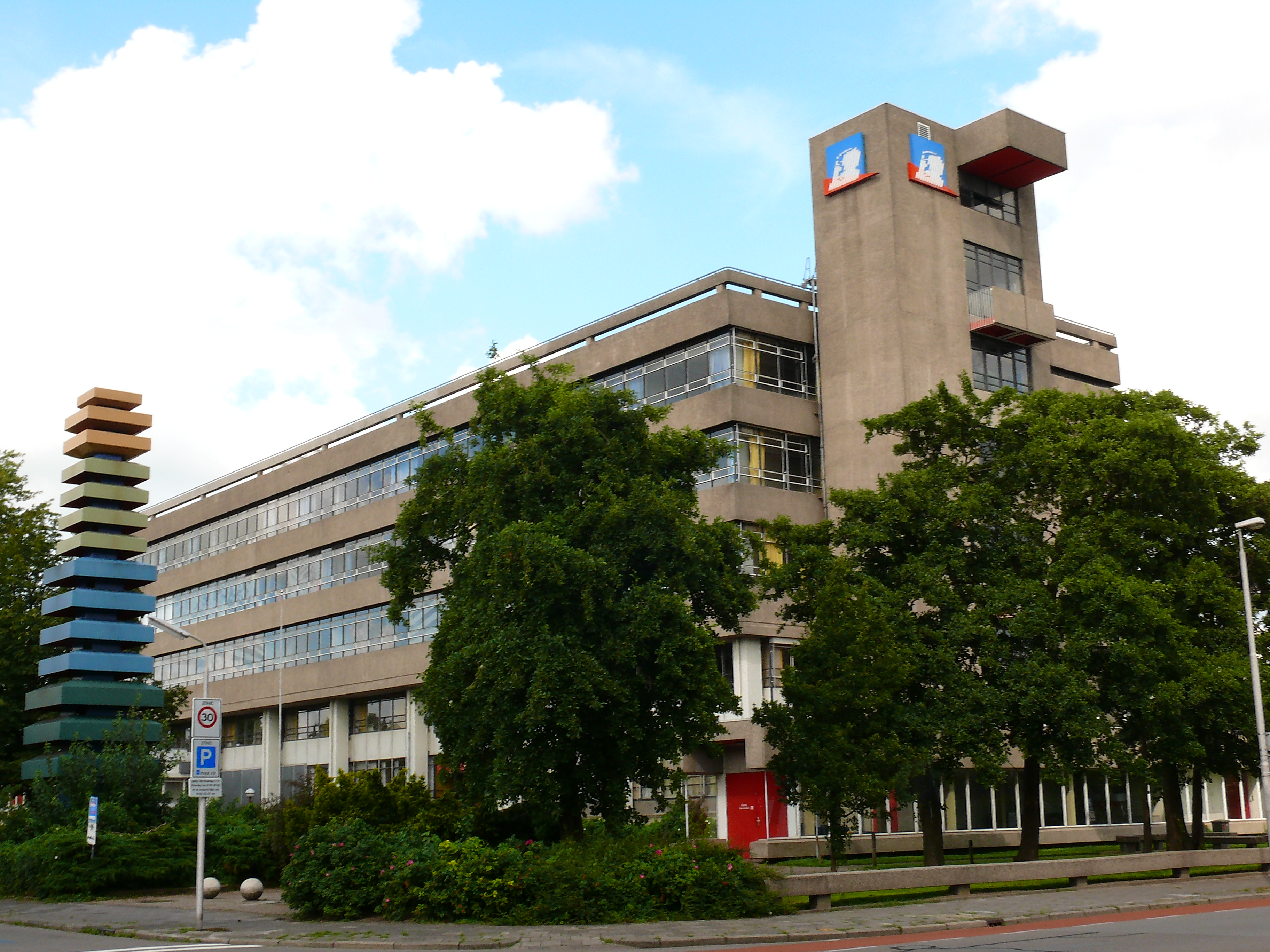 Foto van de NHL in Leeuwarden, vestiging aan de Tesselschadestraat